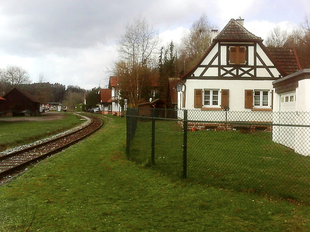 Dahn: Alter Bahnhof Reichenbach